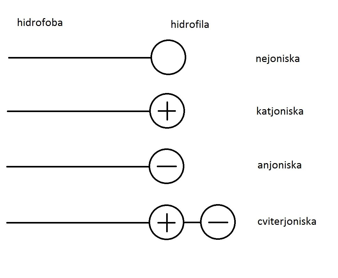 Virsmaktīvo vielu molekulu klasifikācija pēc to galvas grupas.